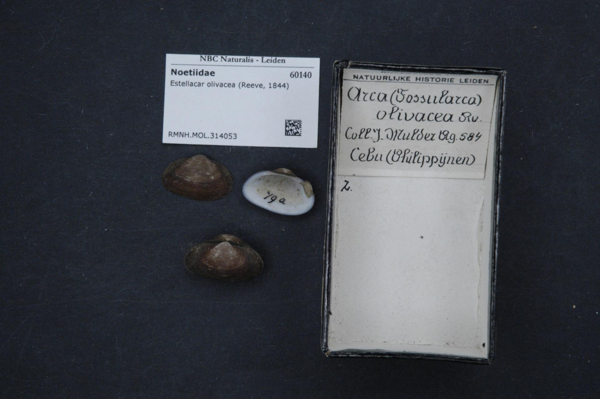 Estellacar olivacea (Reeve, 1844)